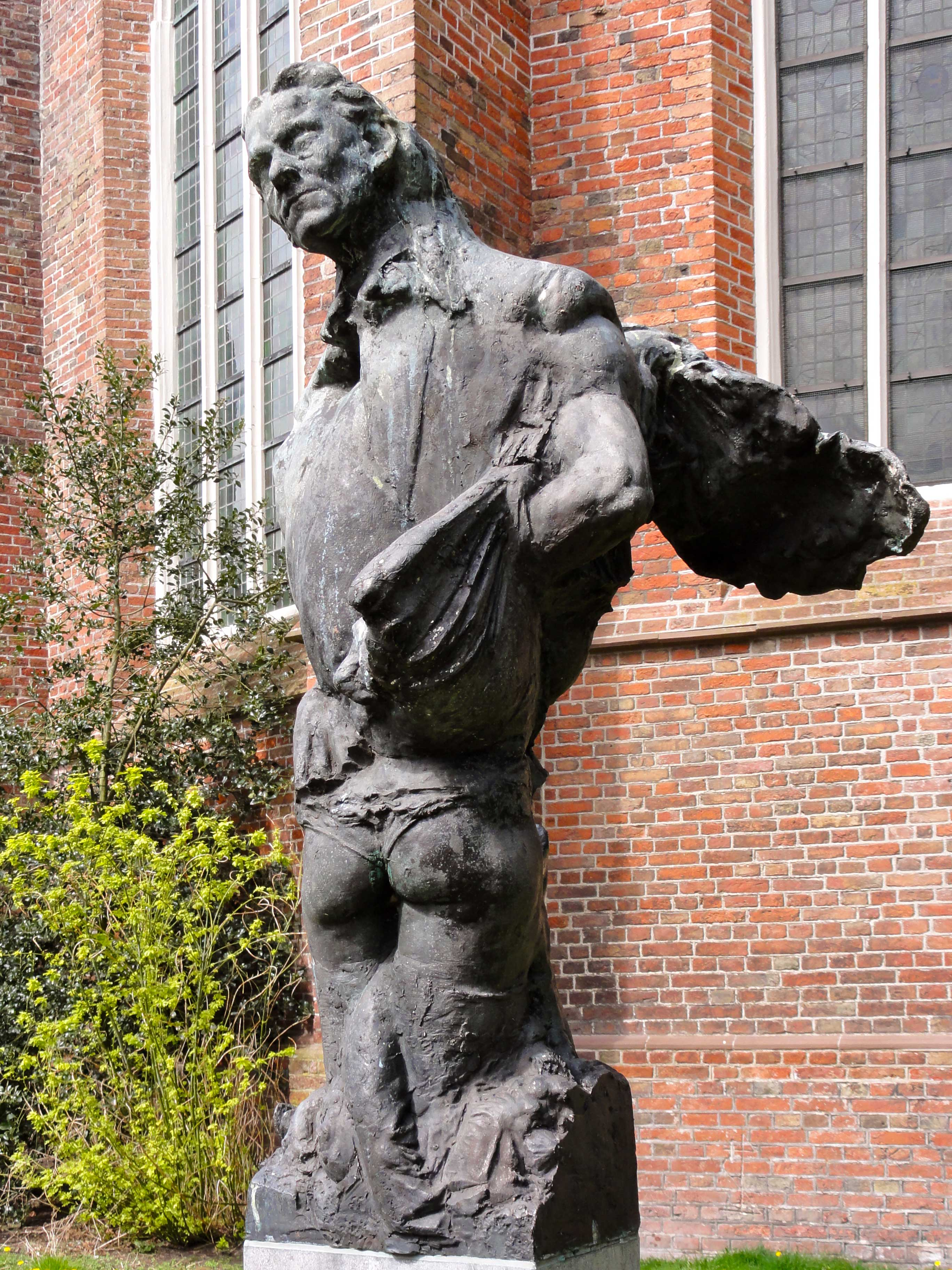 Hendrik de Vries door Norman Burkett, Sint Jansstraat te Groningen